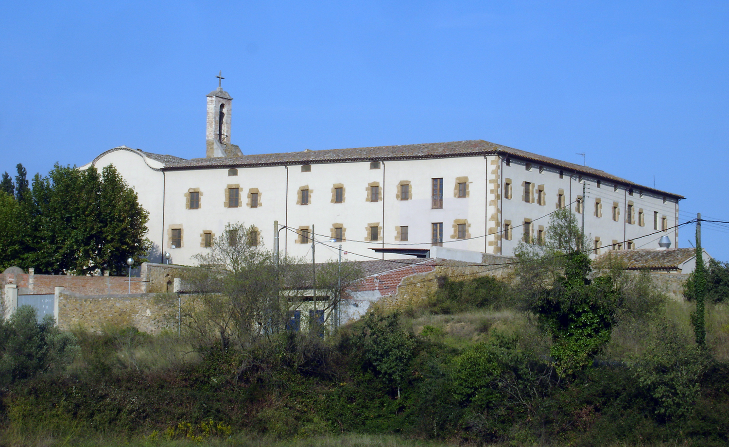 Convent de Sant Sebastià de La Bisbal (Girona, Catalunya, Espanya)